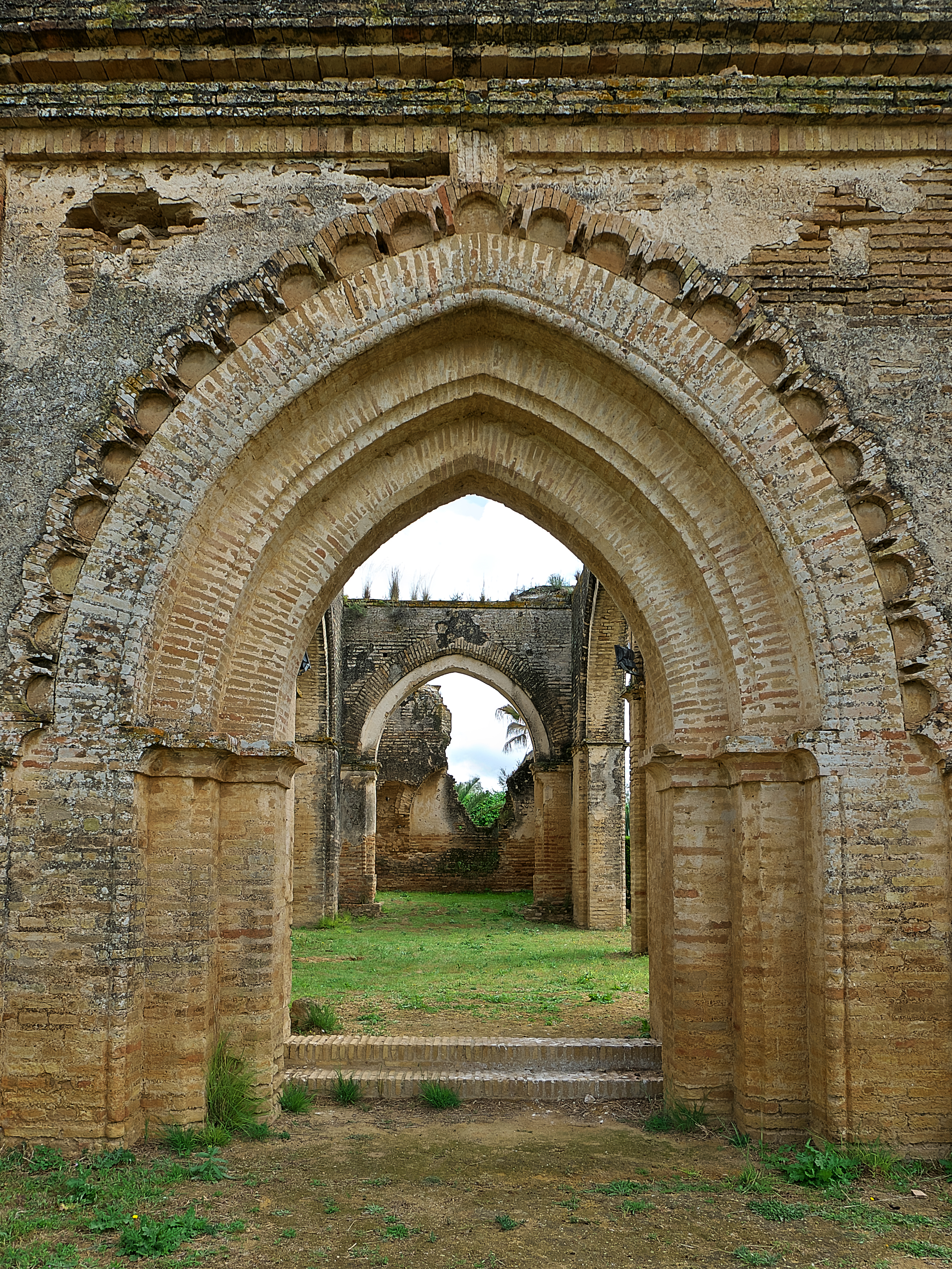 Portada de los pies de la iglesia. Sigue los modelos de la mayoría de las portadas mudéjares de Sevilla y provincia del siglo XIV, con influencia almohade y el empleo del ladrillo.